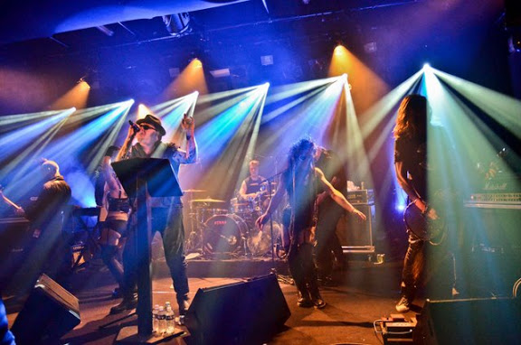 Treponem Pal en concert à la Laiterie de Strasbourg le 1er février 2013